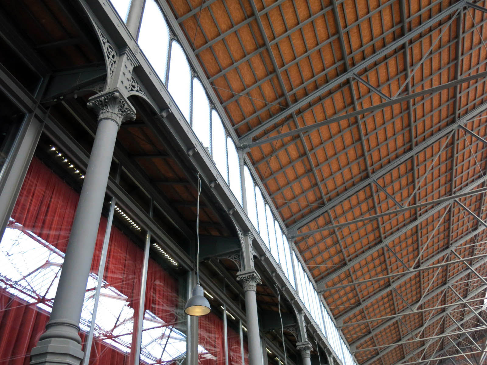 Mercat del Born (Barcelona) Object location41° 23′ 08.76″ N, 2° 11′ 01.54″ E